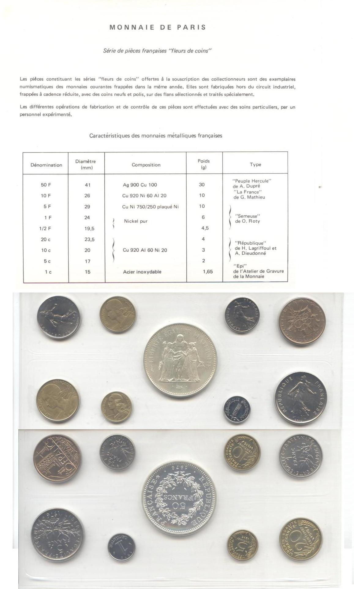 Scan RectoVerso/AversRevers d'une frappe "Fleur de Coin" par la Monnaie de Paris de pièces françaises millésime 1976